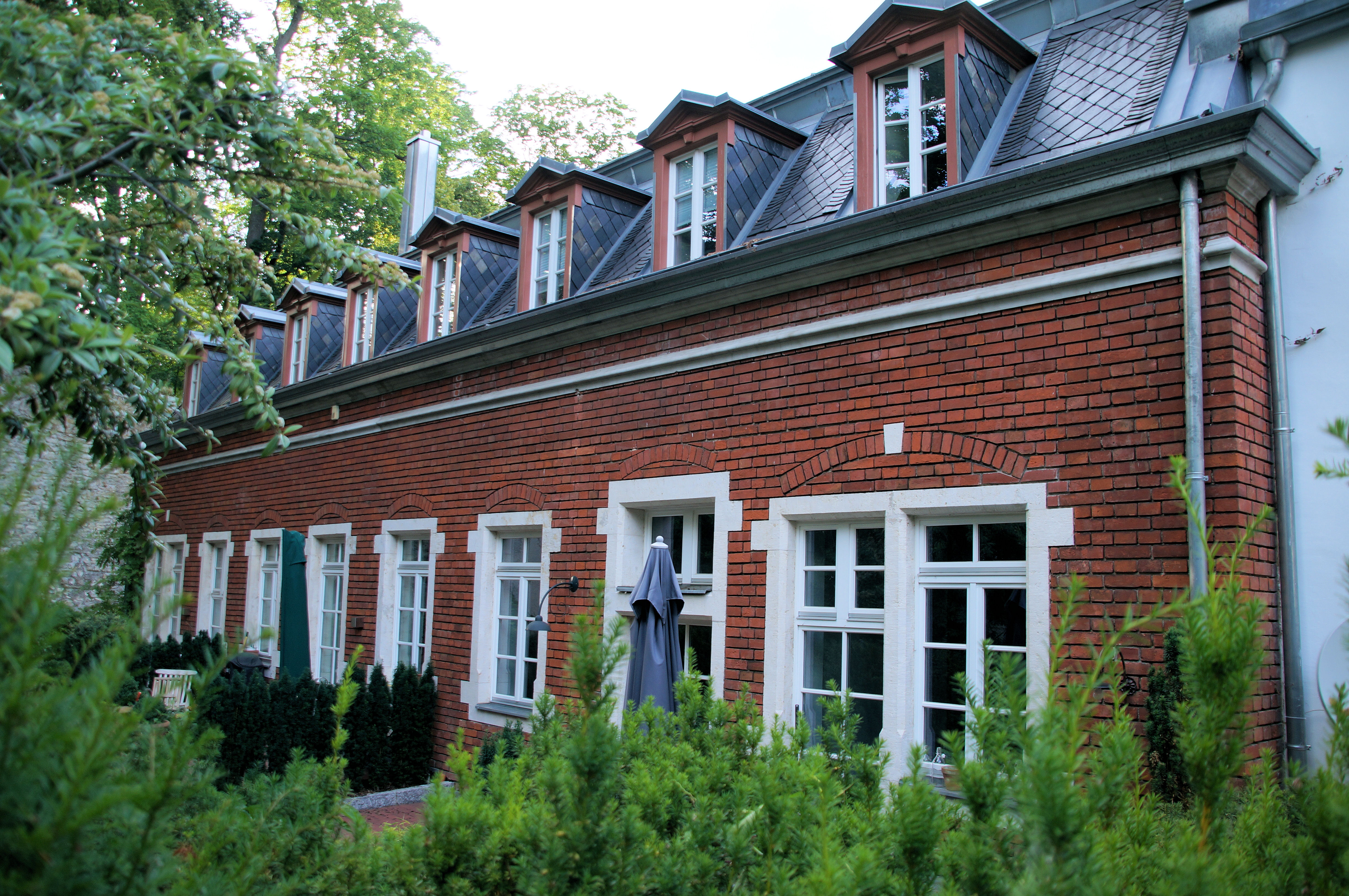 Ehemaliger Herzoglich-Württembergischer Reitstall, eingeschossiger Mansardwalmdachbau, Sichtziegelmauerwerk mit Hausteingliederungen, bez. 1890, von Christian Zinstag, für Wohnnutzung teilweise erneuert This is a photograph of an architectural monument.